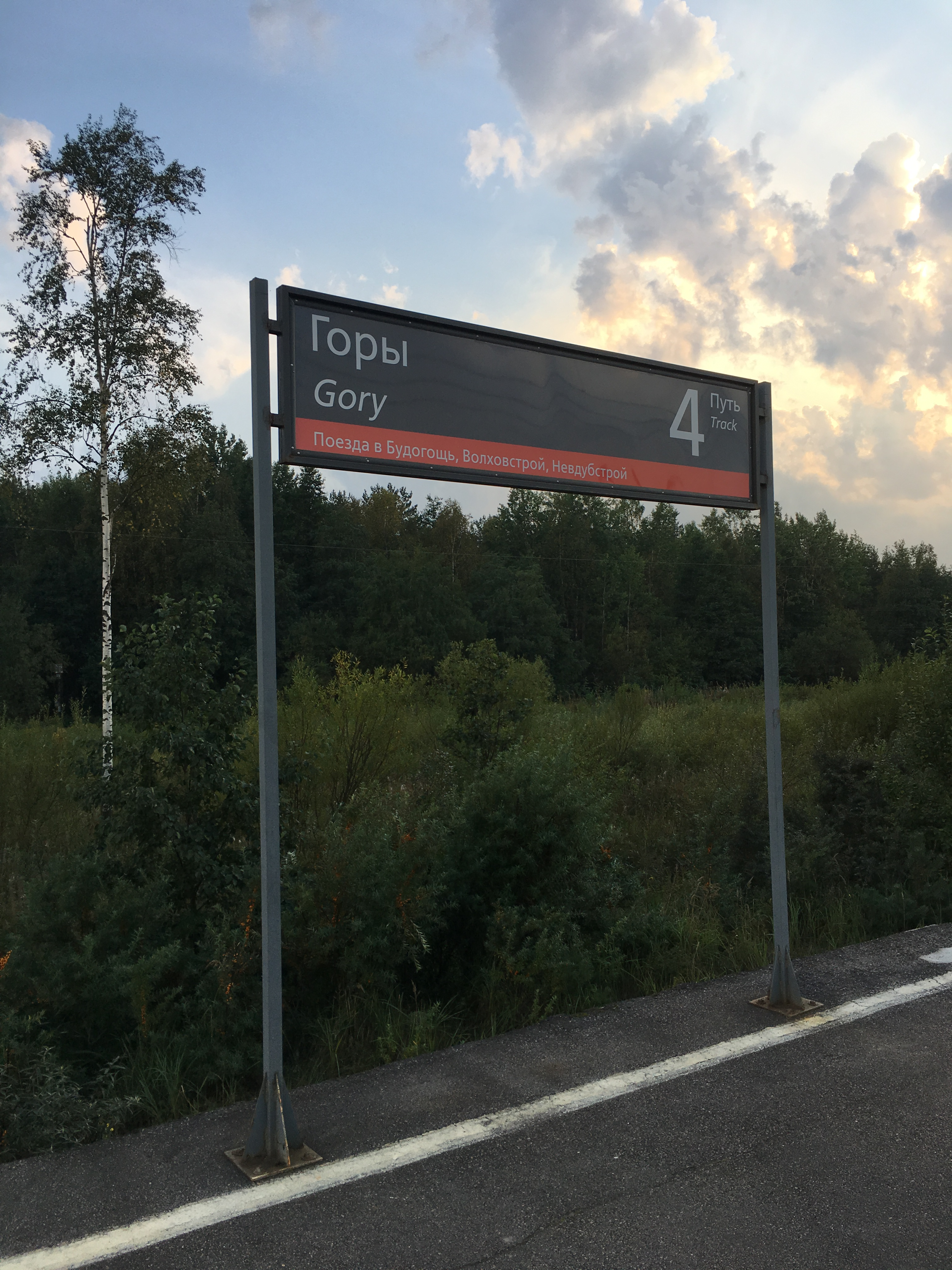 Станция «Горы» (табличка)